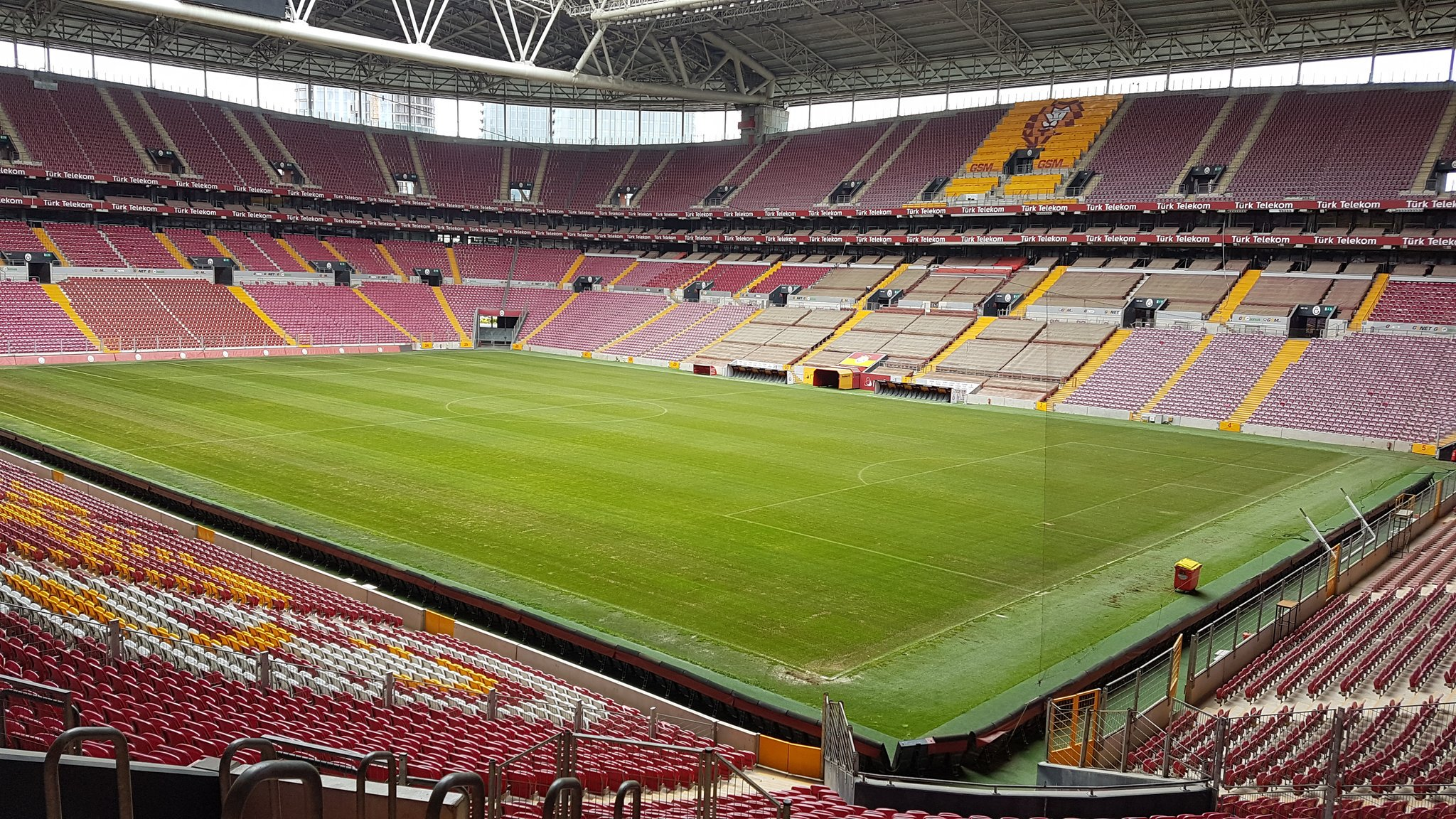 Galatasaray Arena_North-East Corner